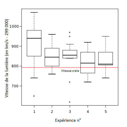 Boîte à moustache issues des données obtenues grâce à l'expérience de Michelson-Morley. Il y a 4 données aberrantes dans la colonne du milieu et 1 dans la 1ère colonne.